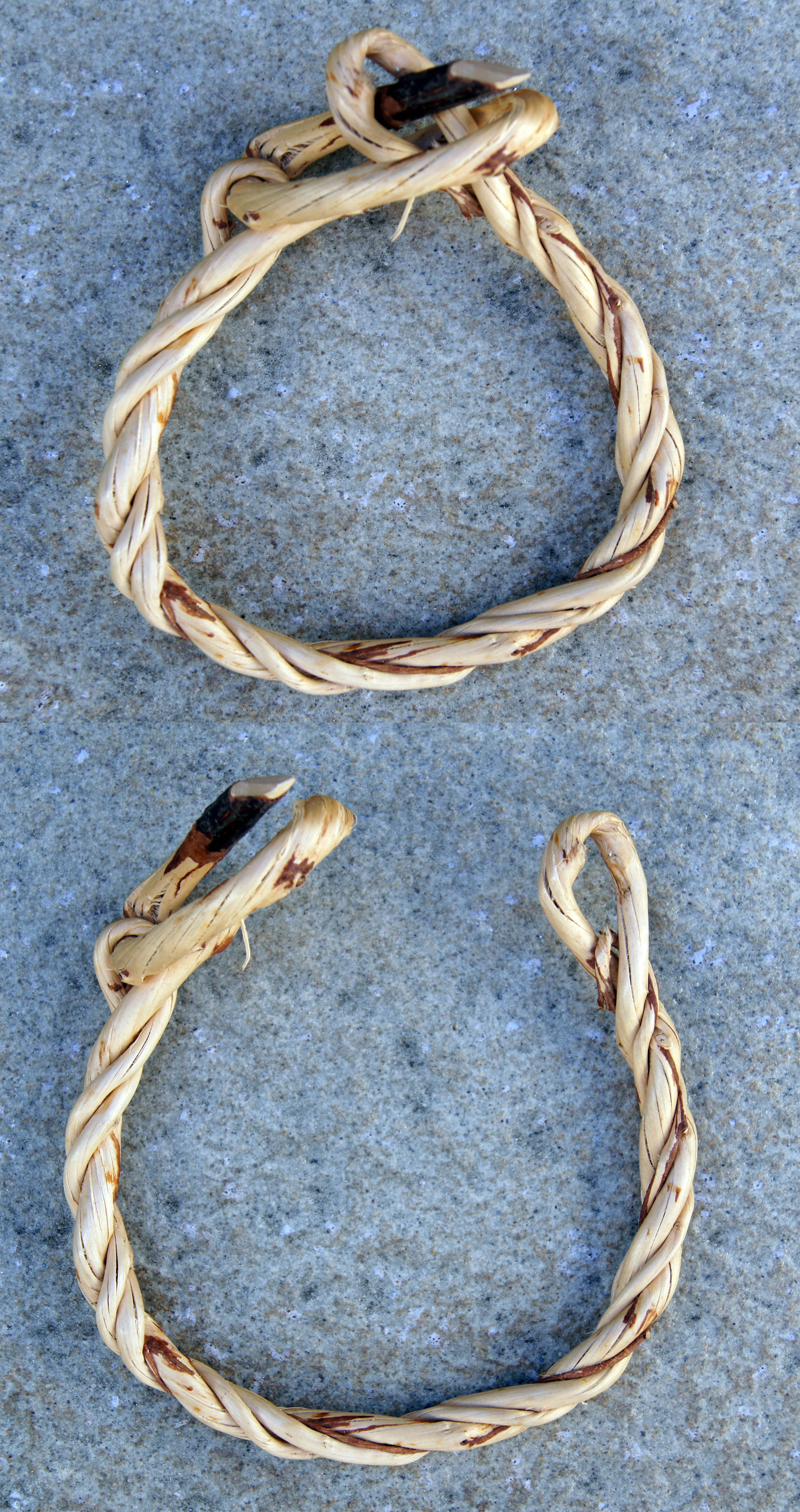 Vidjespenning